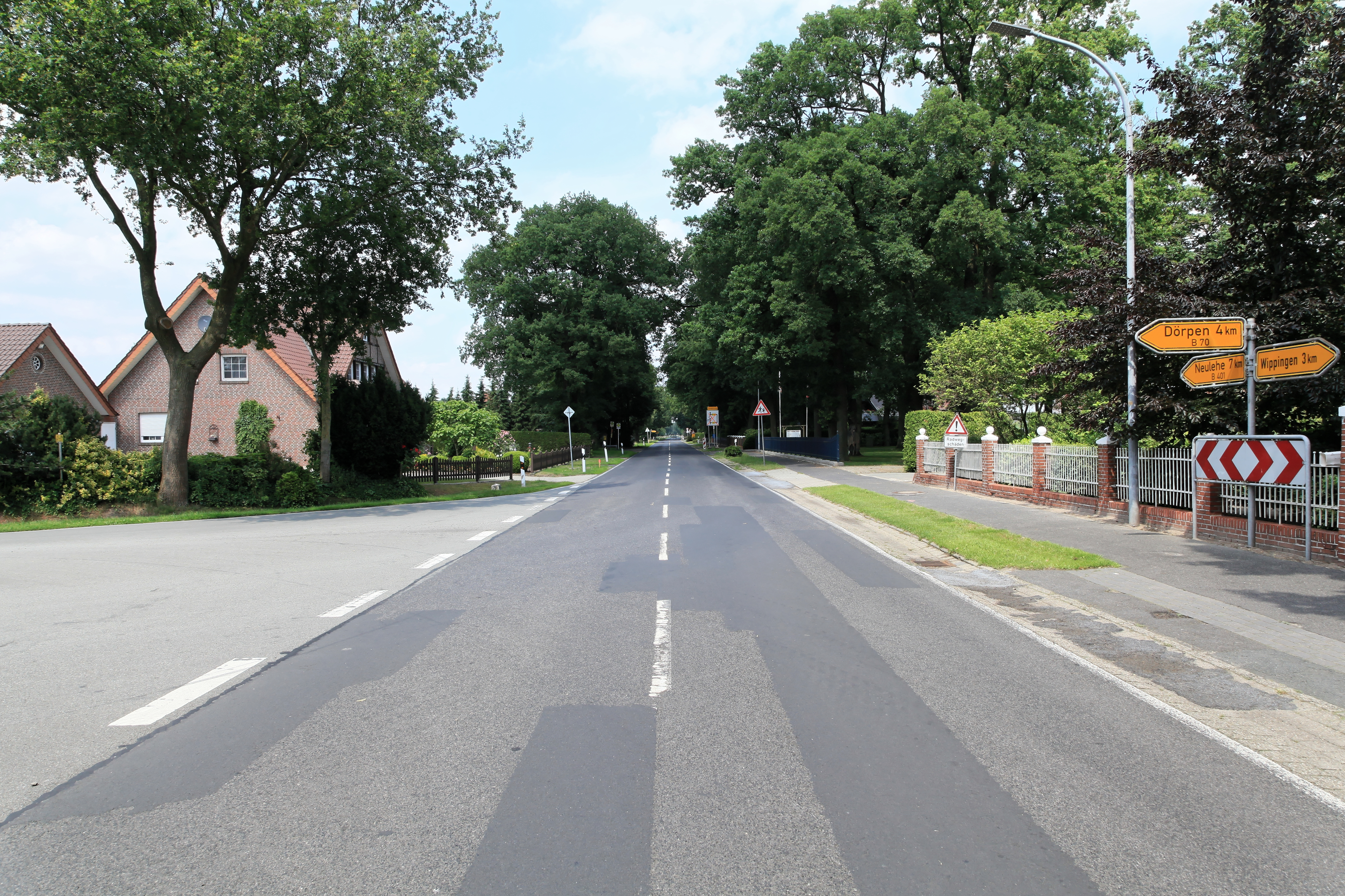 Westlicher Zweig der Straße Neudörpen in Neudörpen in Dörpen